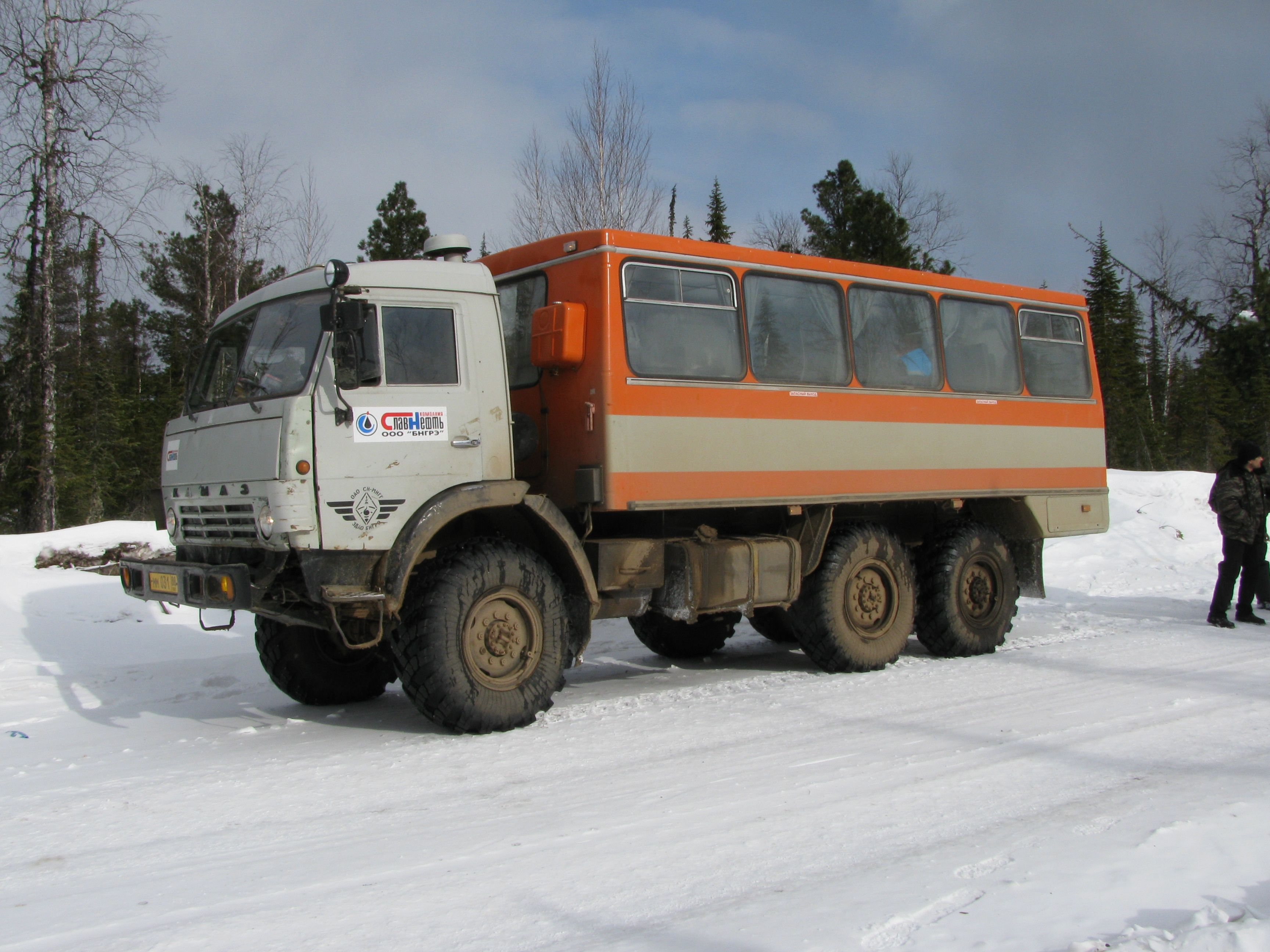 Камаз-Батыр. На нем нас с базы отвозили на скважины.